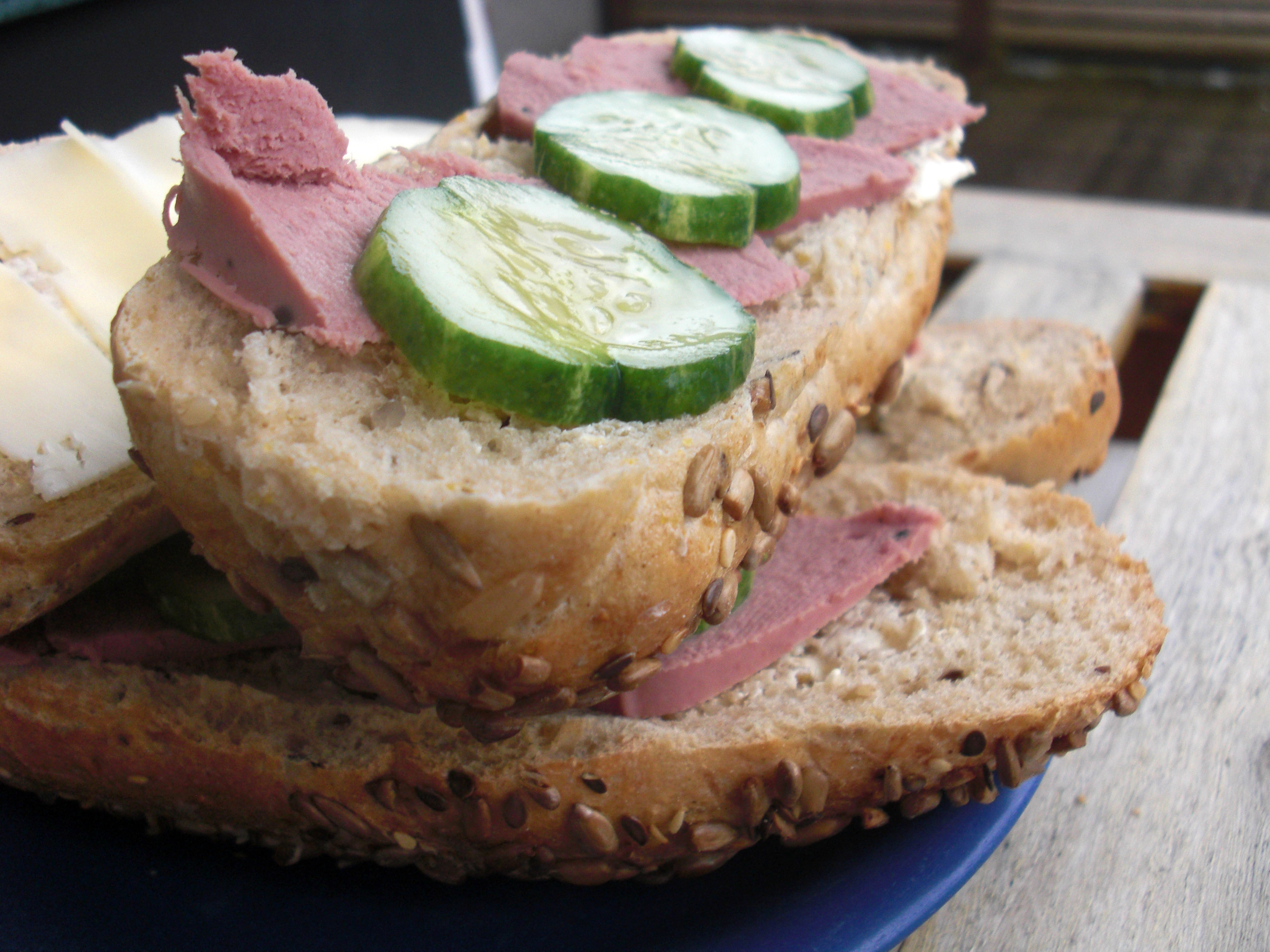 En stapel av fyra smörgåsar. Tre med leverpastej och saltgrurka och en med ost.